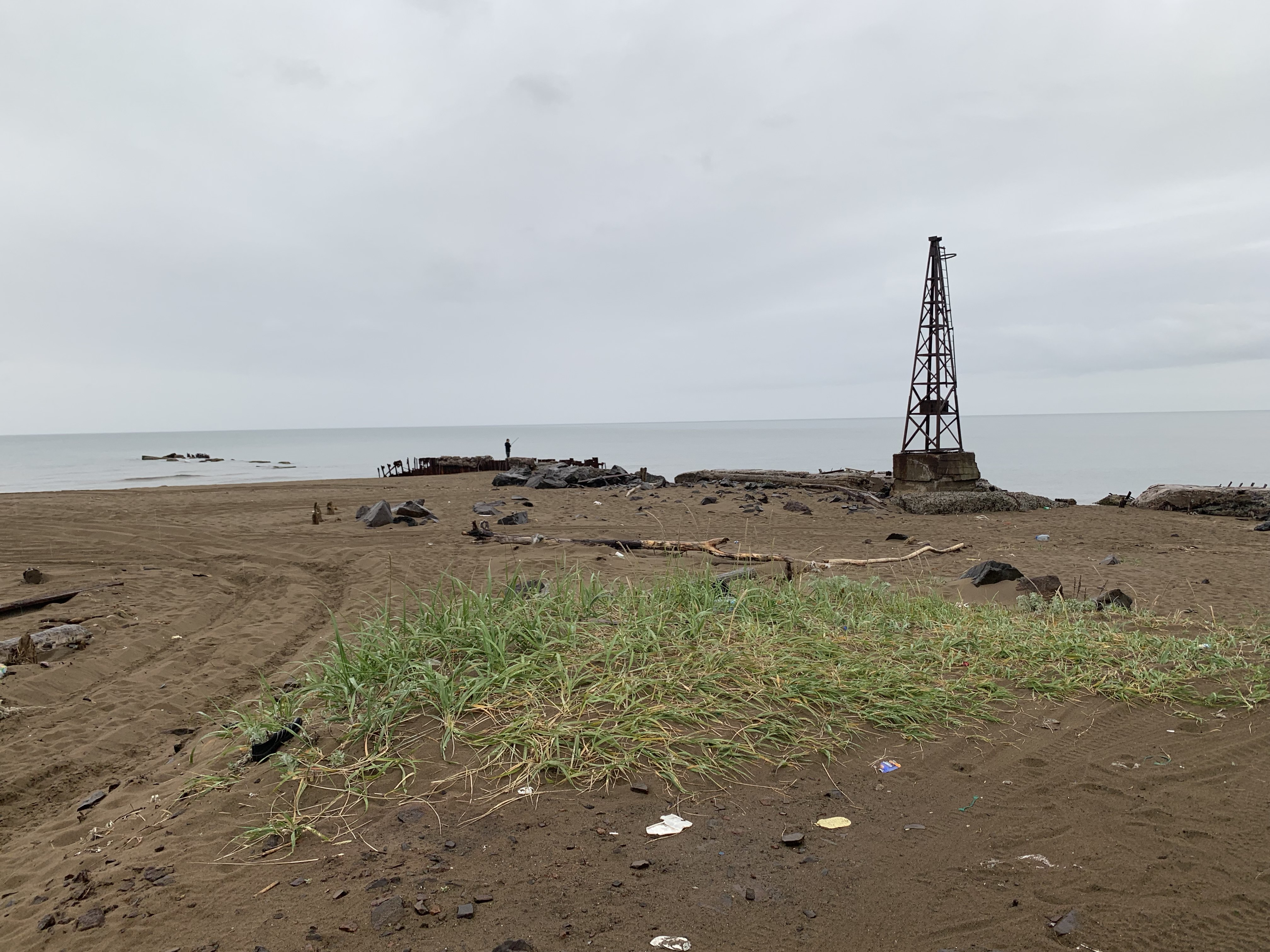 Остатки пирса